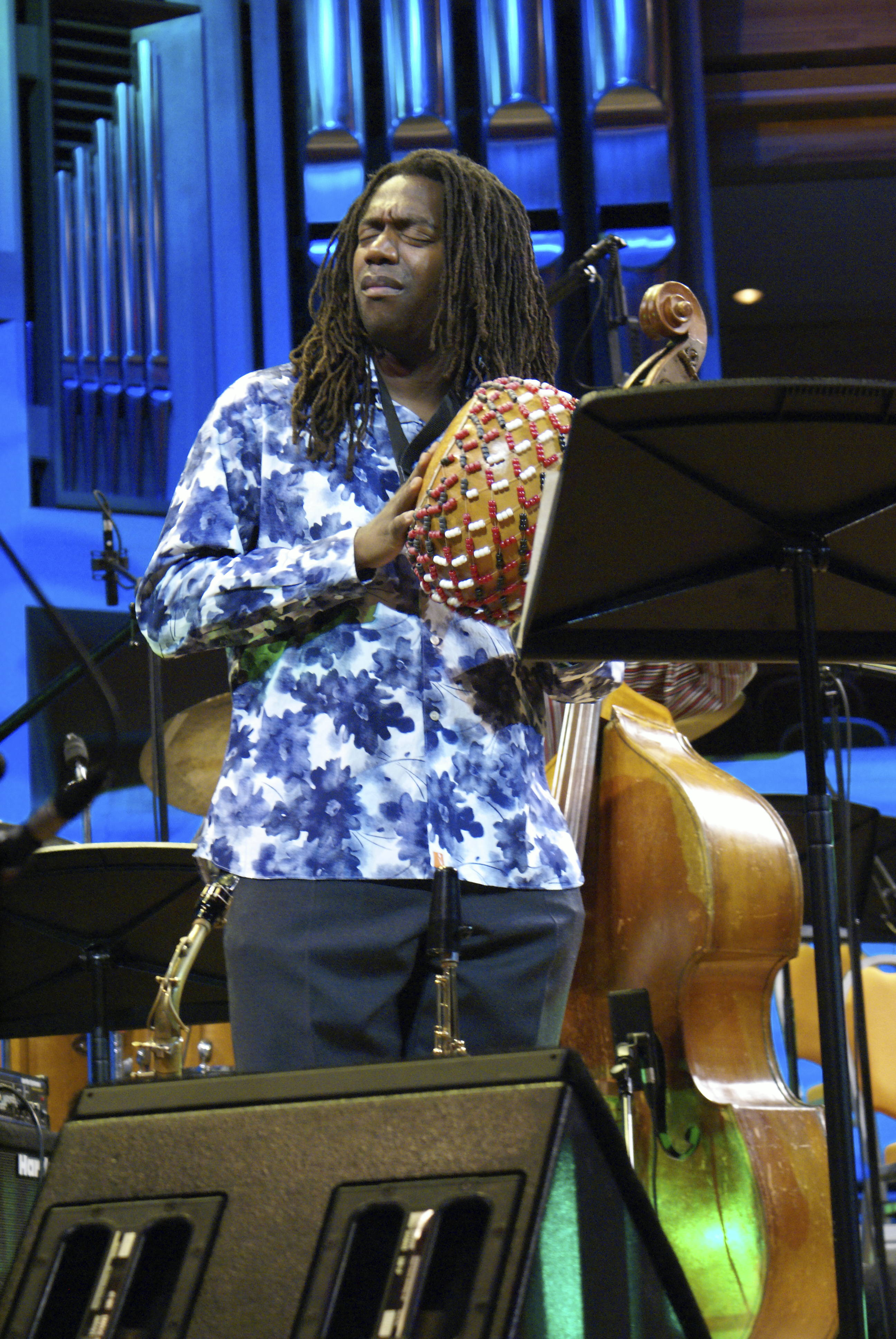 Фотография сделана на концерте Гонзало Рубалькаба 17 Февраля, 2008 года.